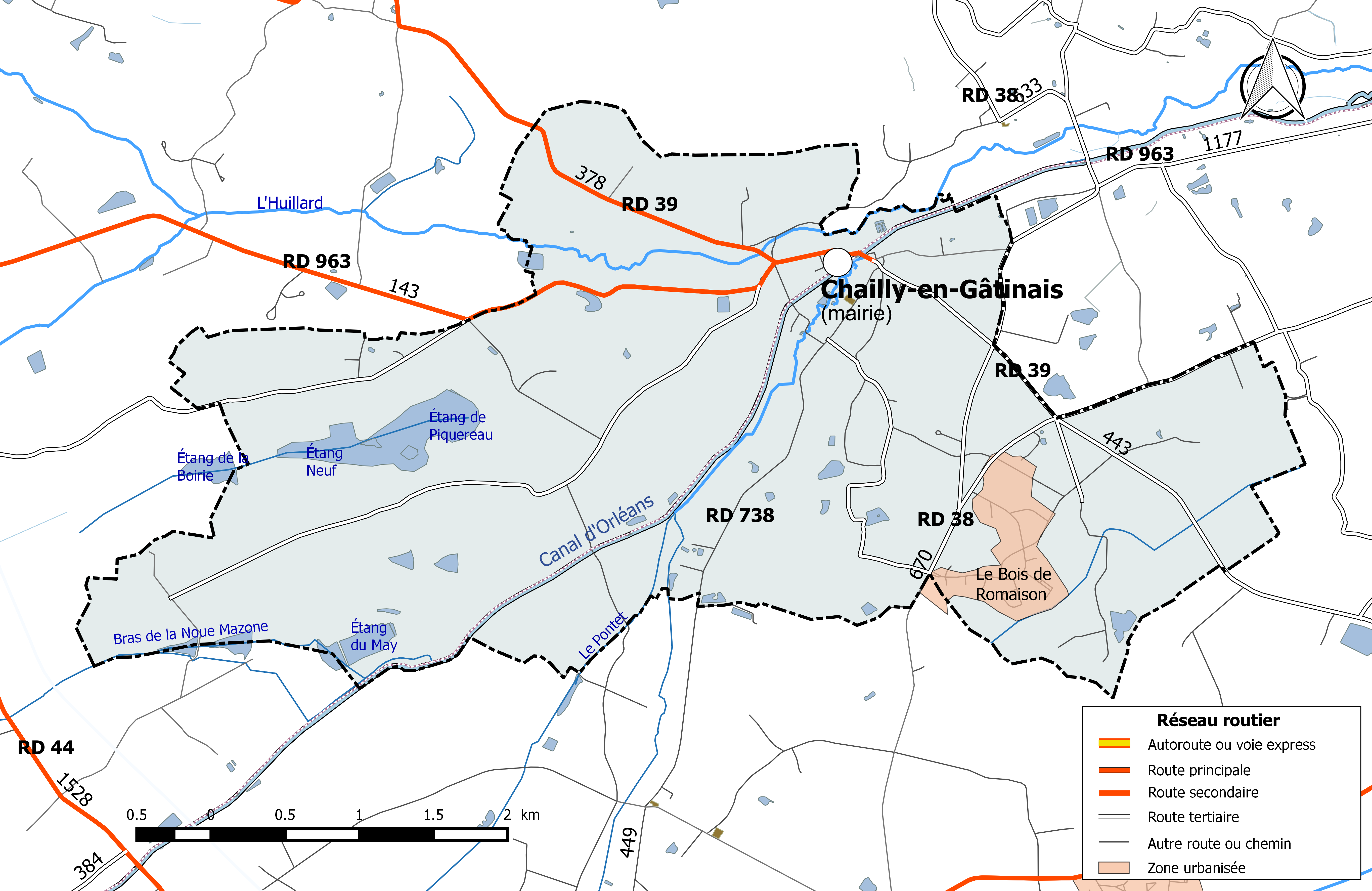 Carte du réseau routier de la commune de Chailly-en-Gâtinais.